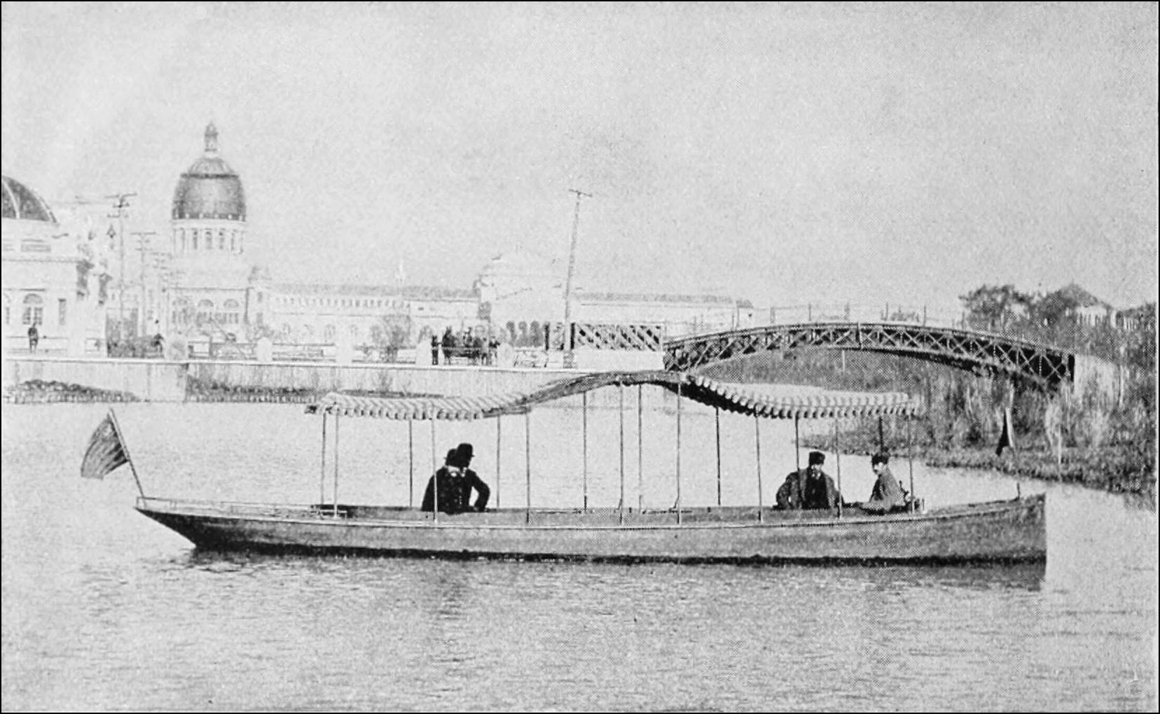 Electric launch